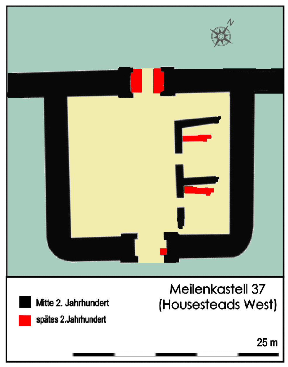 Befundplan des MK 37 (Housesteads West), Hadrianswall